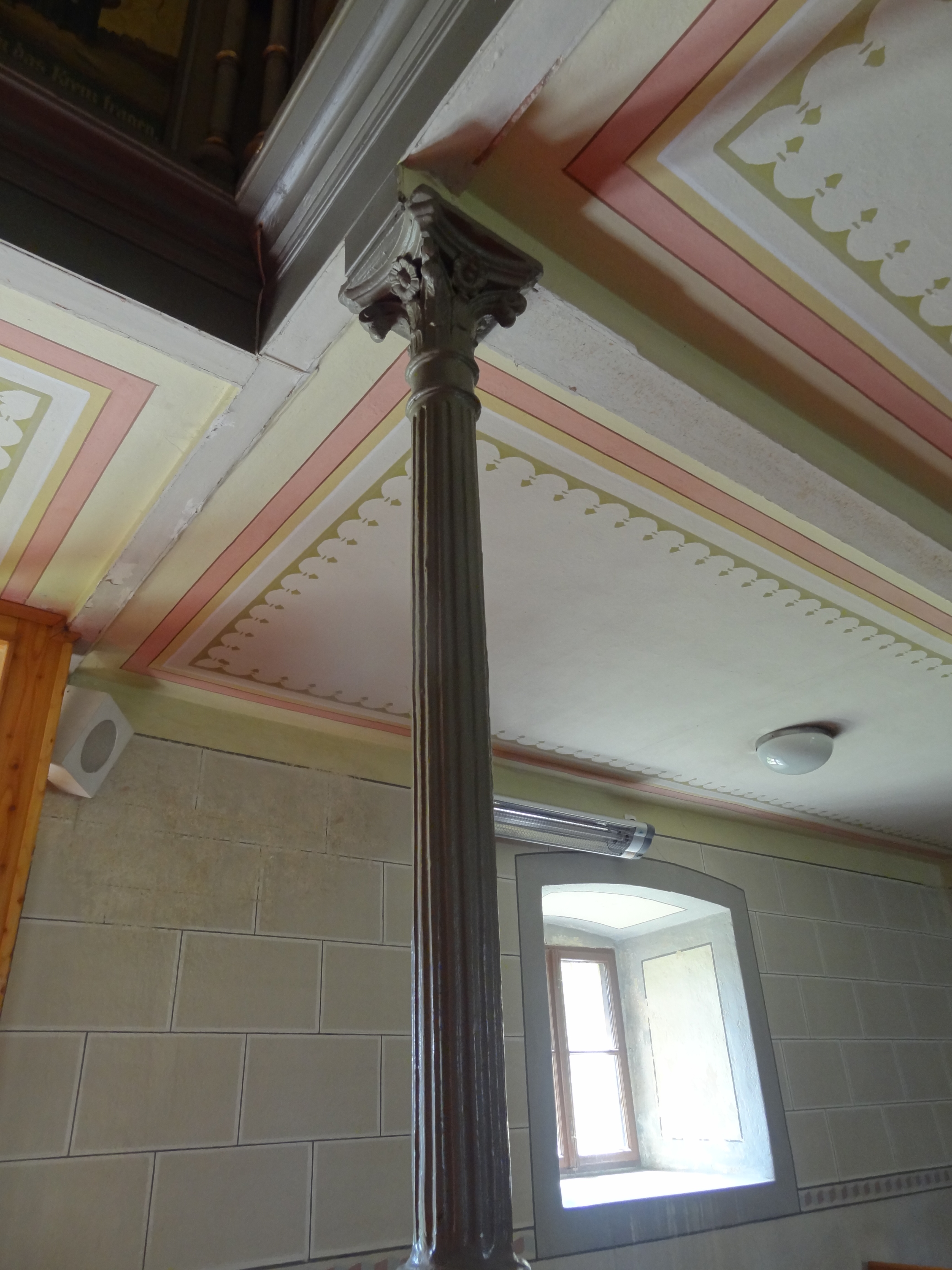 stĺp držiaci empóru s antickým vzorom